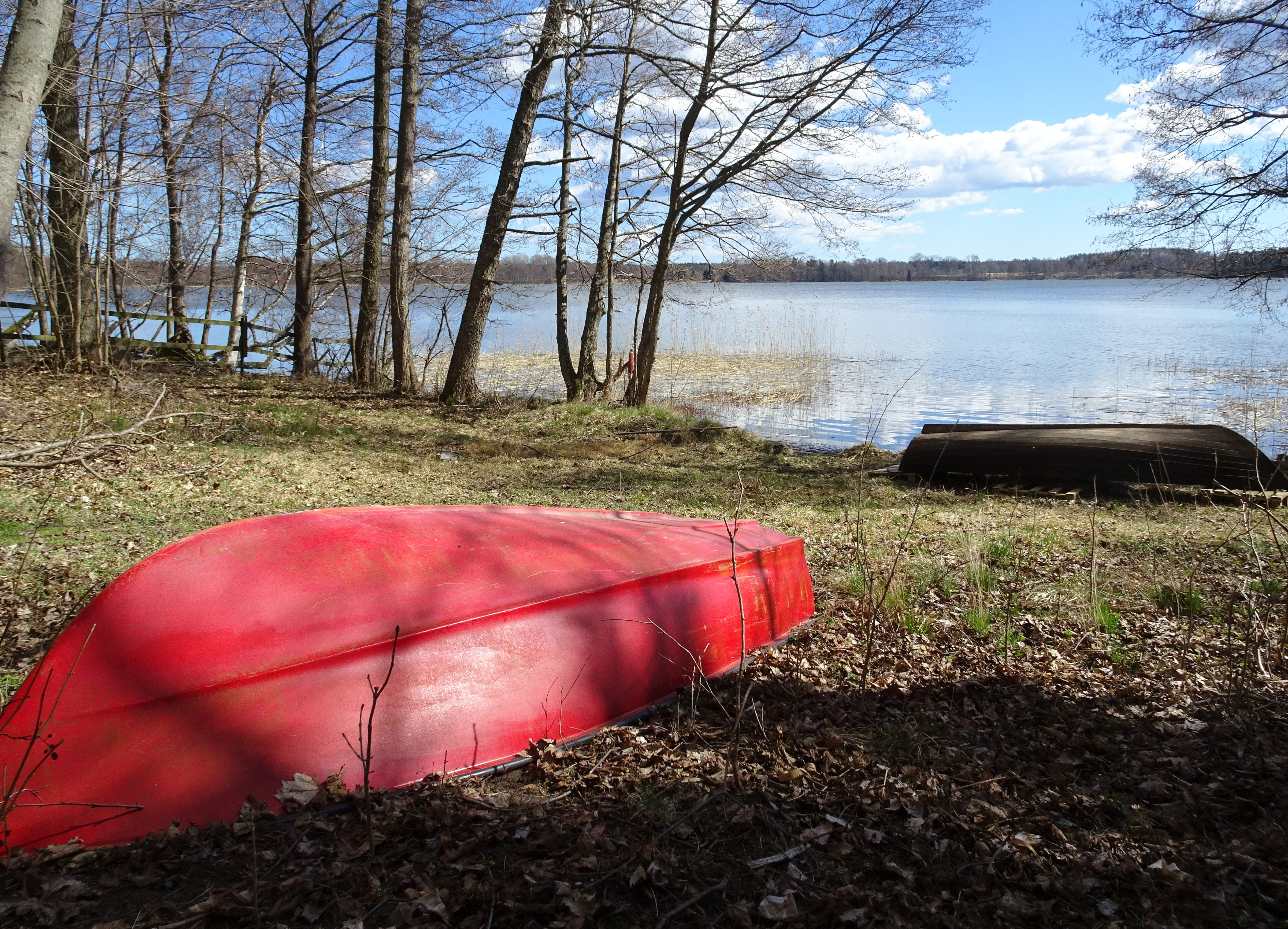 Sjön Västra Styran i Ösmo socken